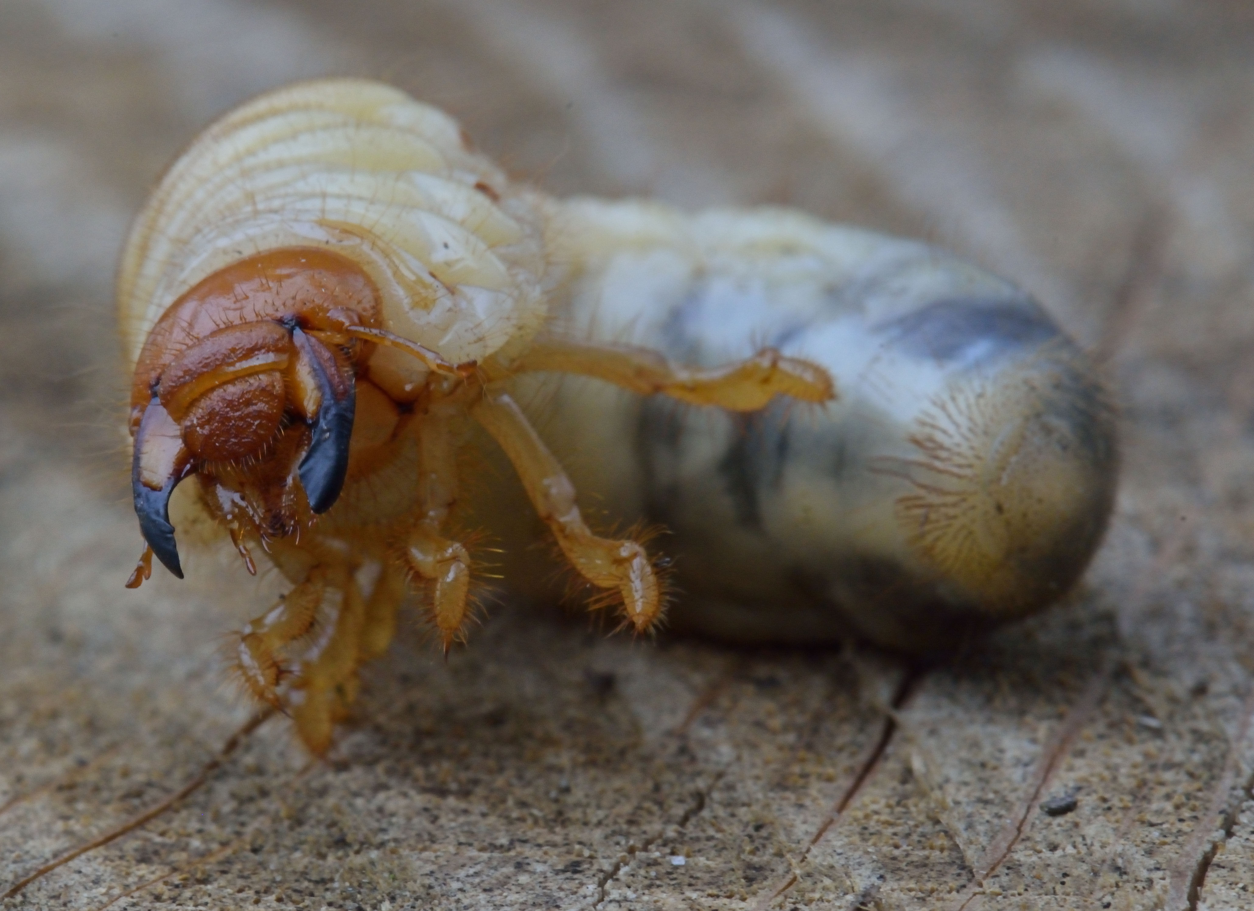 Melolontha melolontha, meikever